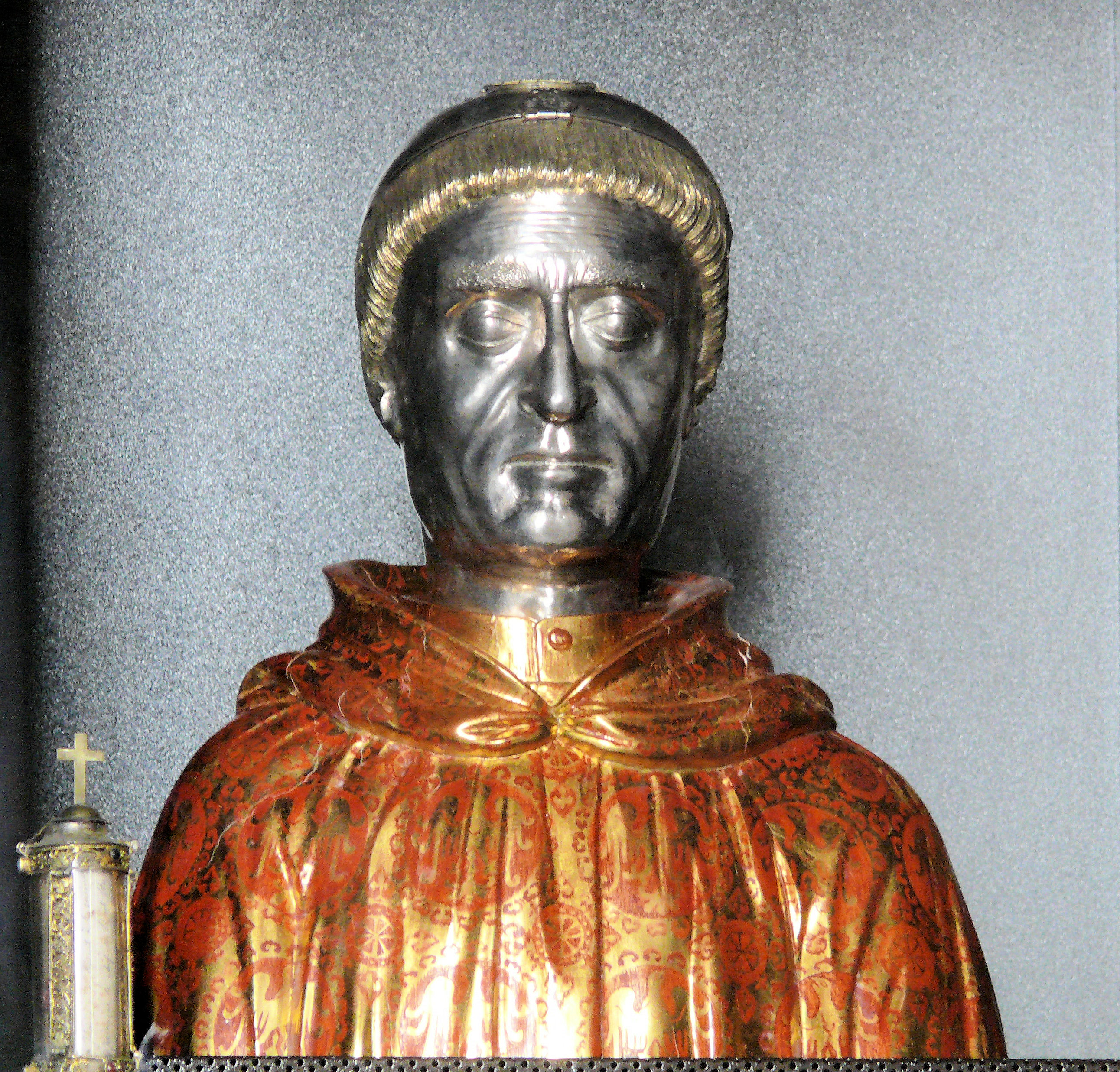 Saint-Sylvestre (Haute-Vienne) - Buste reliquaire de saint Etienne de Muret